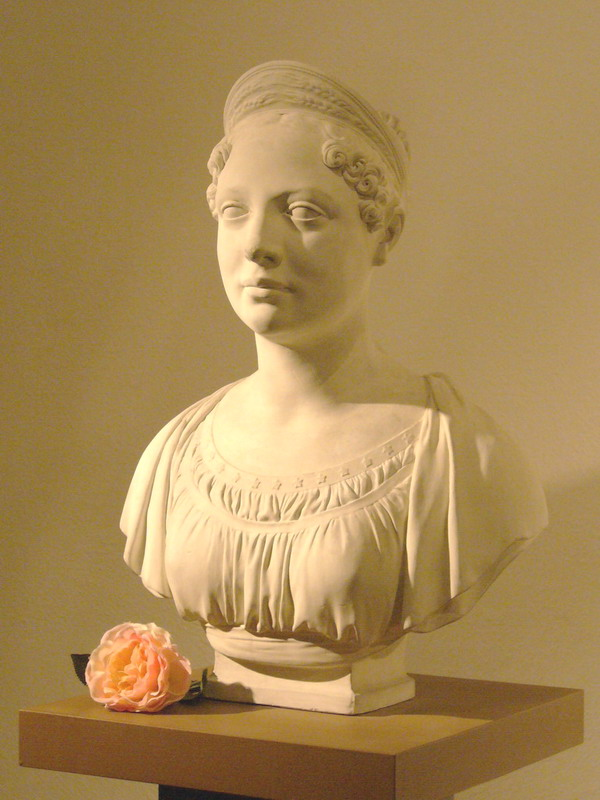 Büste der Königin Katharina Pawlowna von Württemberg von Johann Heinrich Dannecker in der Grabkapelle auf dem Württemberg.